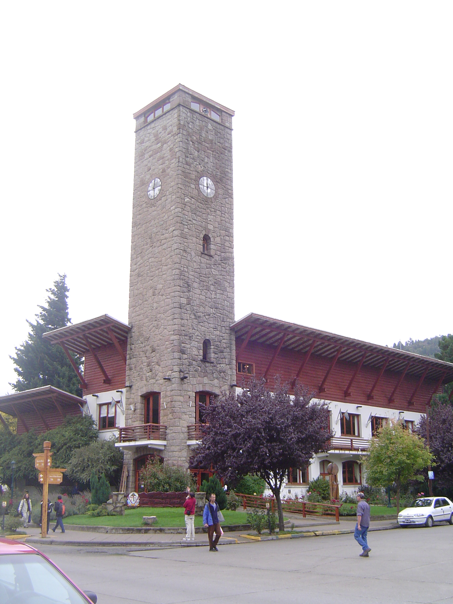 Edificio municipal de San Martín de los Andes